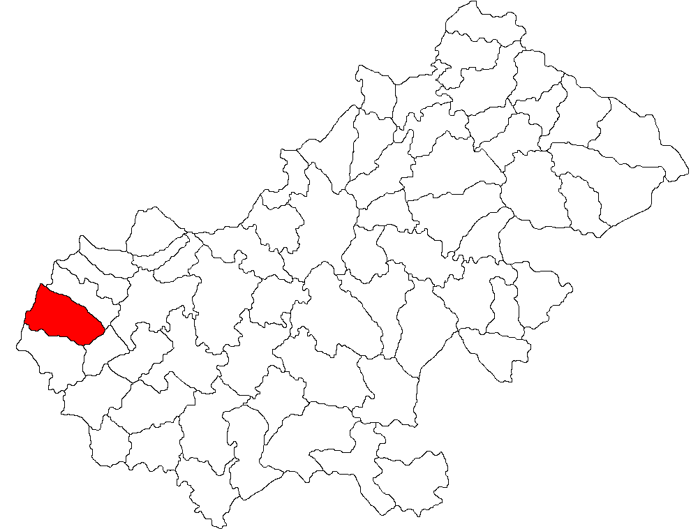 Categorie:Hărţi ale judeţului Satu Mare